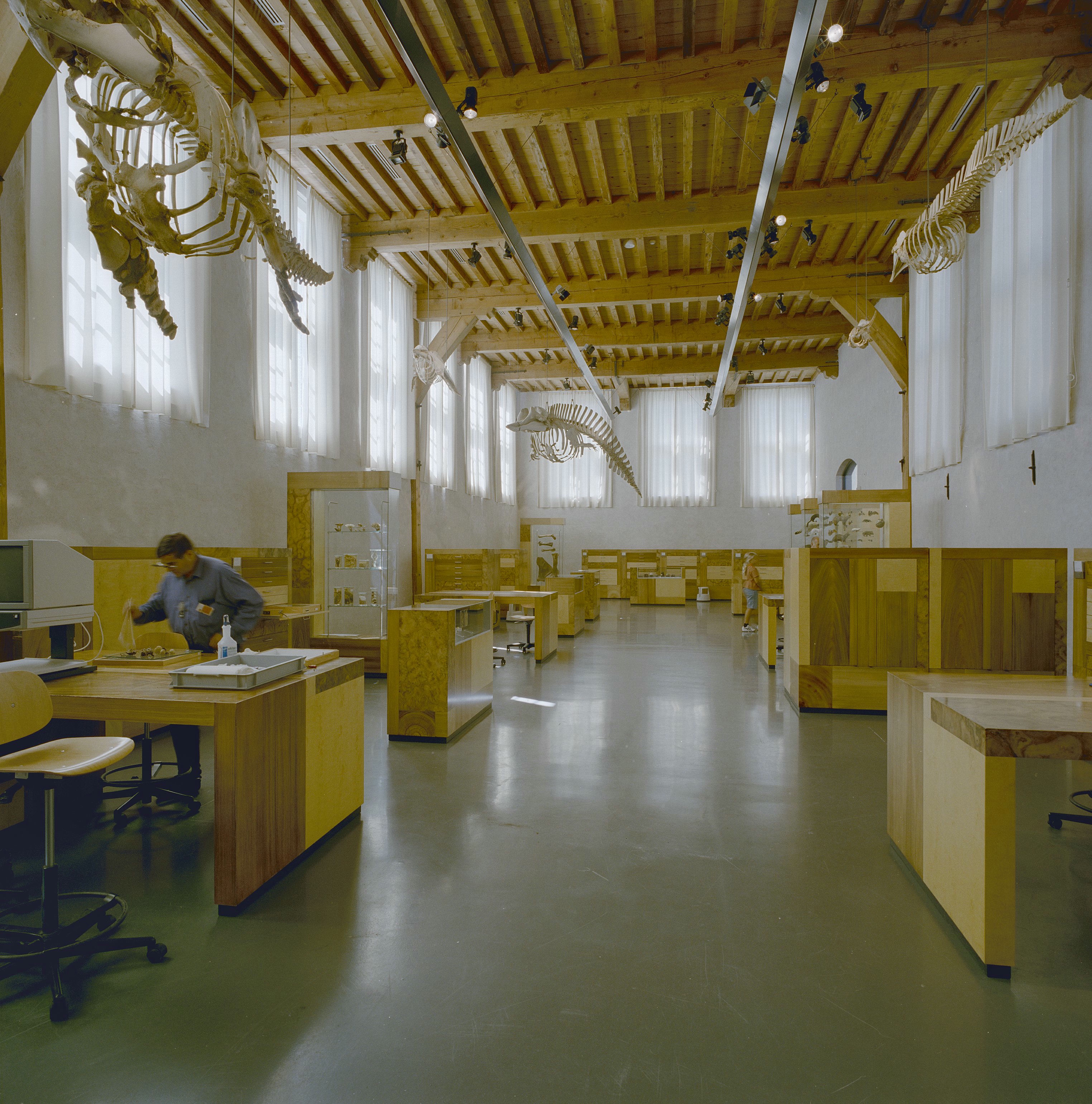 Voormalig Pesthuis: Interieur werkruimte, overzicht plafond met houten balken (opmerking: Herbestemming)